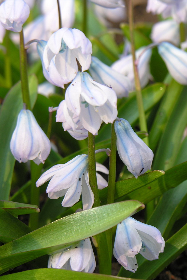 Scyliažiedė puškinija (Puschkinia scilloides) Šeima. Hiacintiniai (Hyacinthaceae) Fotografavo: Algirdas, 2006 m. balandžio 26 d., kapinėse.